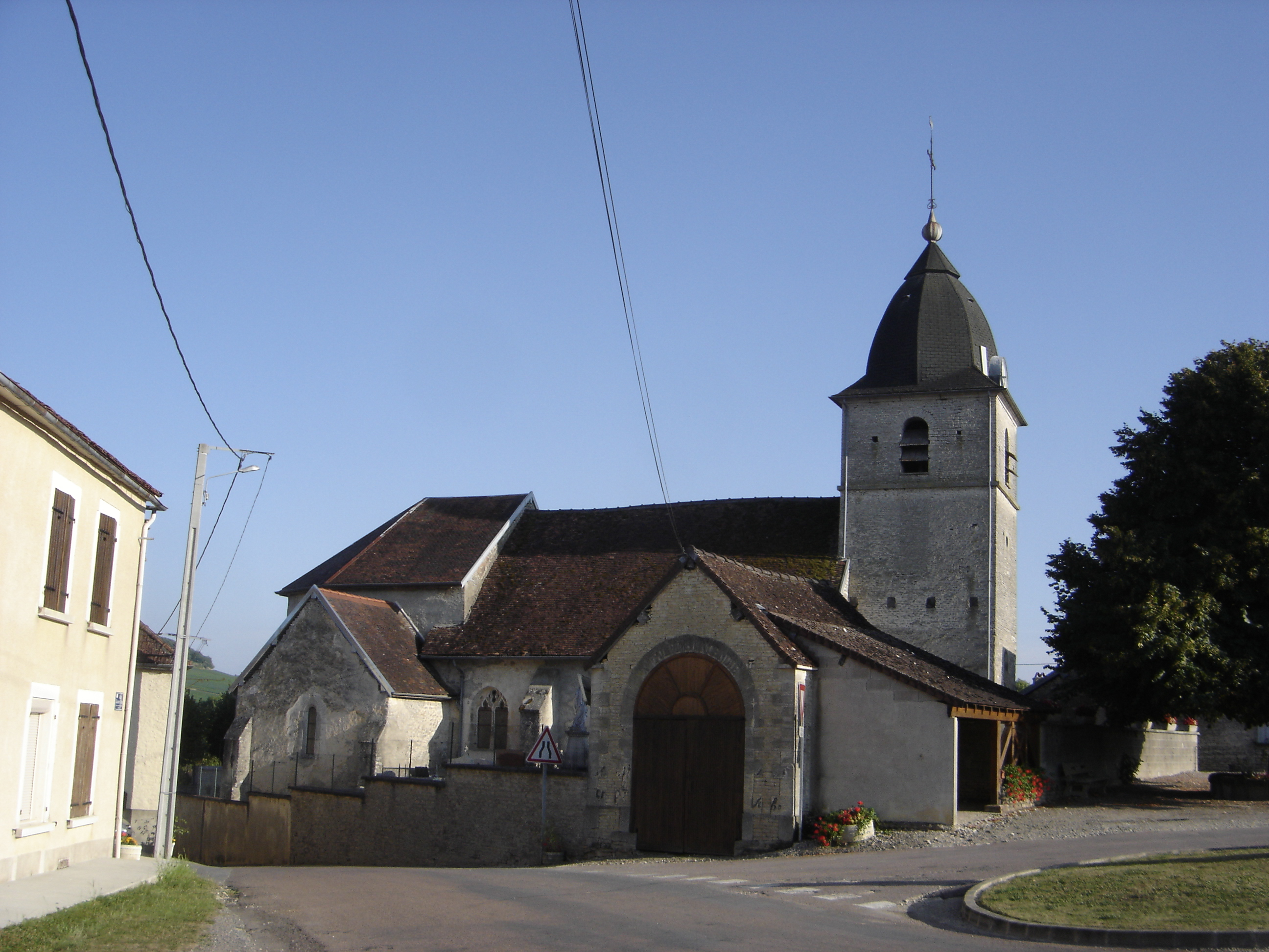 église de Meurville - Aube - France